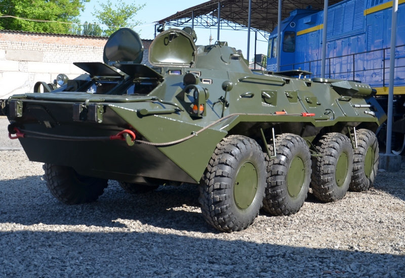 Отремонтированный Николаевский теплвозоремонтным заводом БТР-80, мая 2014